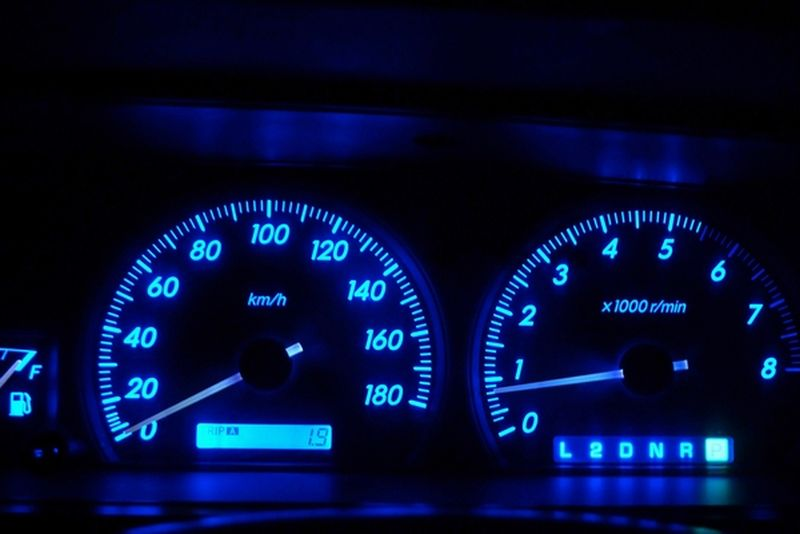 メーターパネルをＢＬＵＥ ＬＥＤに交換し、車内を落ち着いた雰囲気にしています。